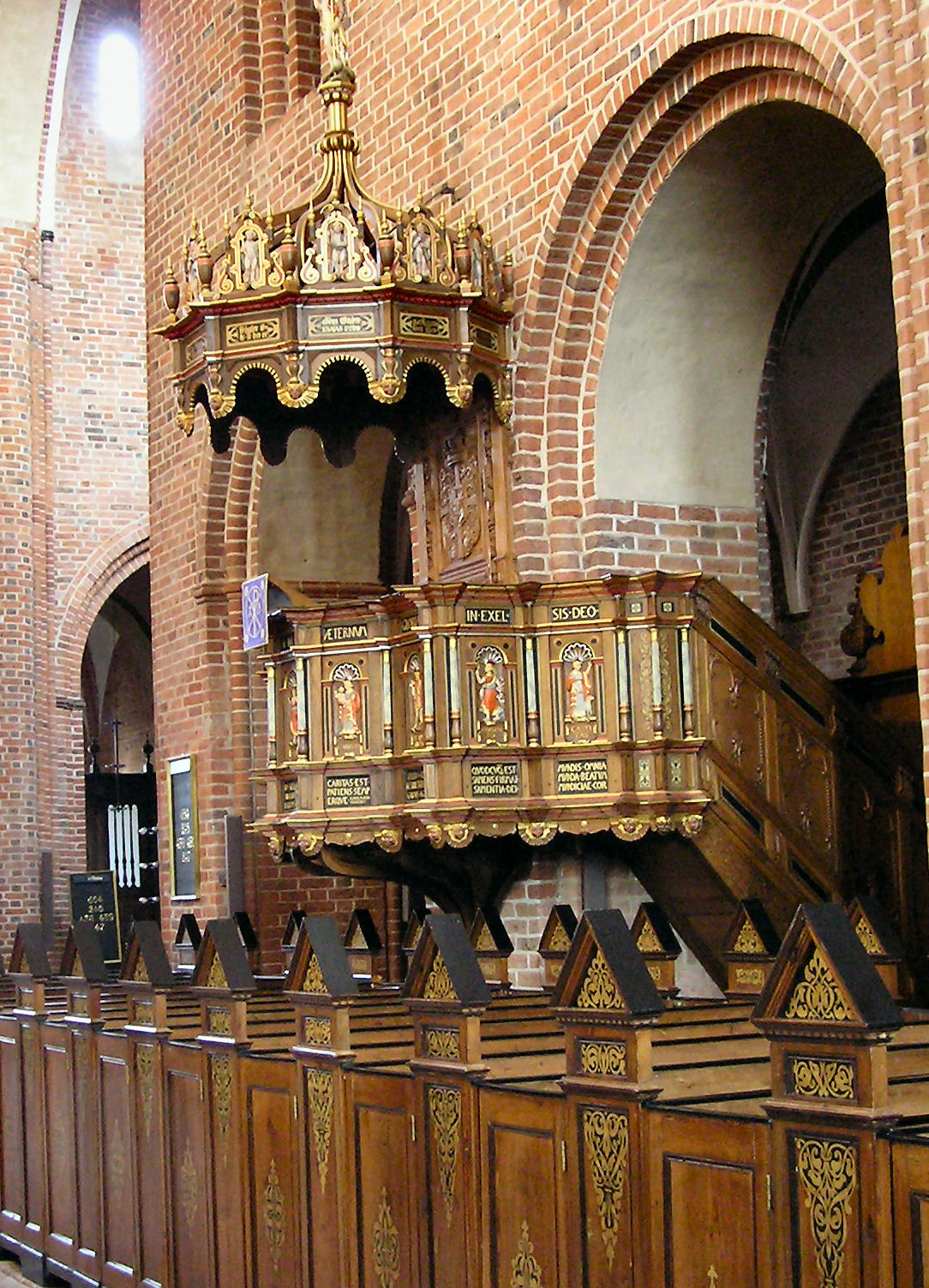 Løgumkloster Kirke, Prædikestol